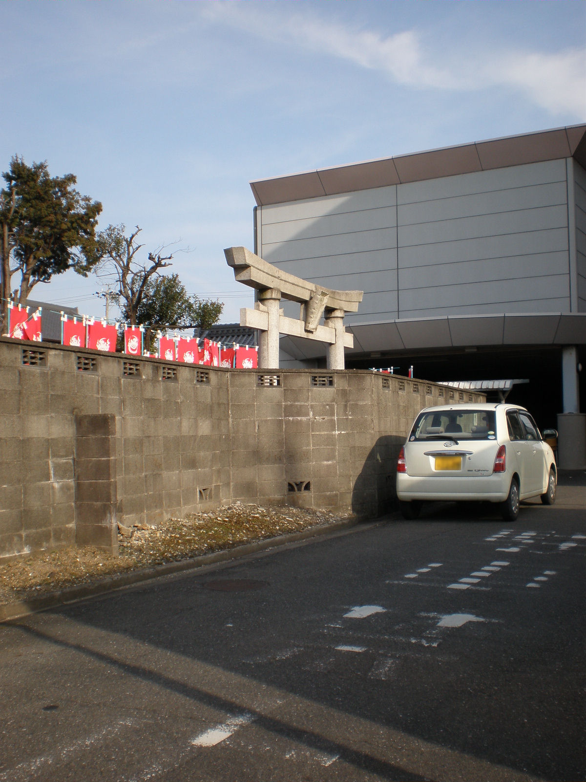 愛知県小牧市にある西町の稲荷堂の鳥居